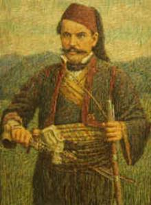 Петр Пеция работы анонима.